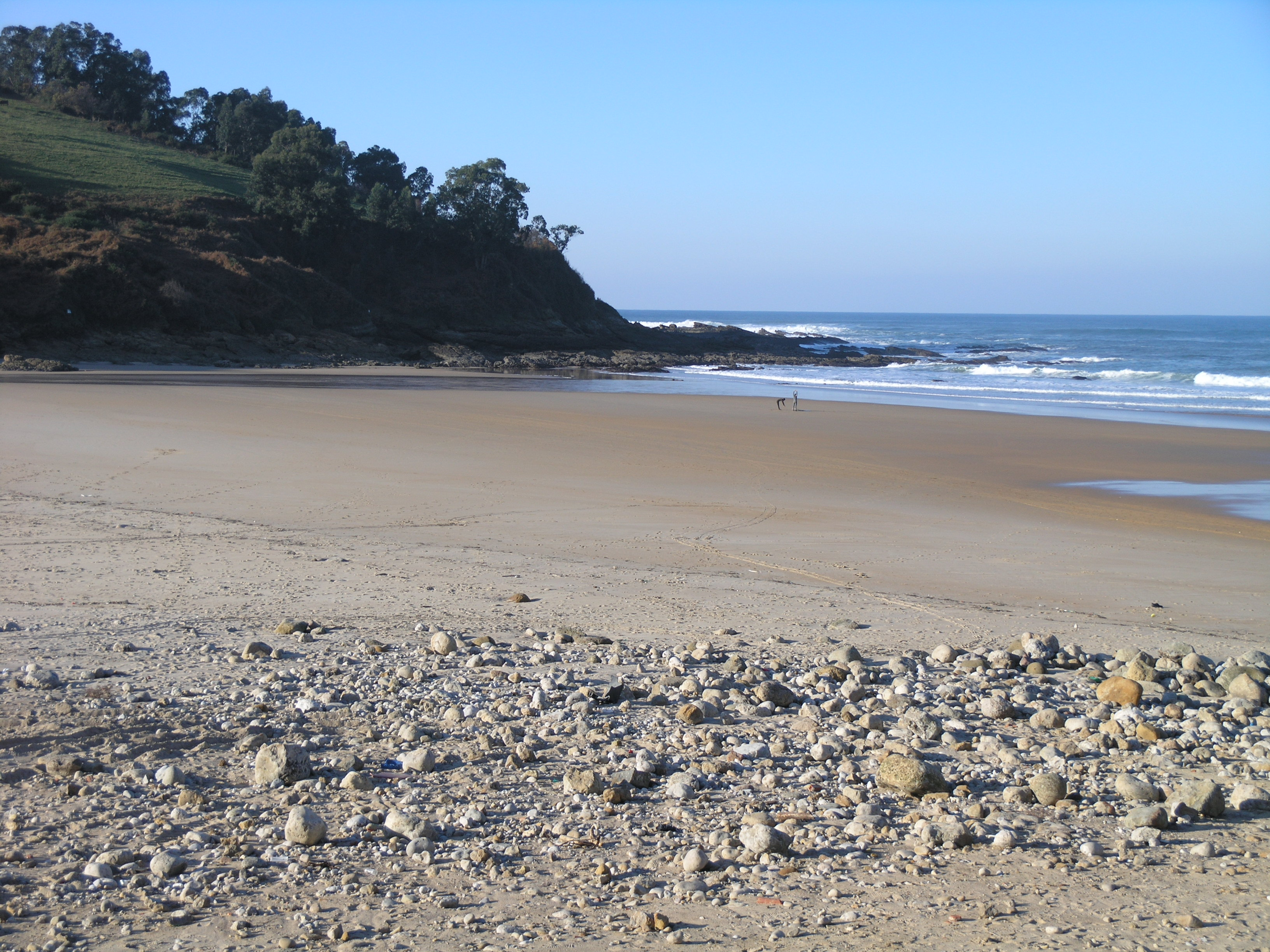 Playa de Luaña, en Cóbreces (Alfoz de Lloredo), Cantabria, España.